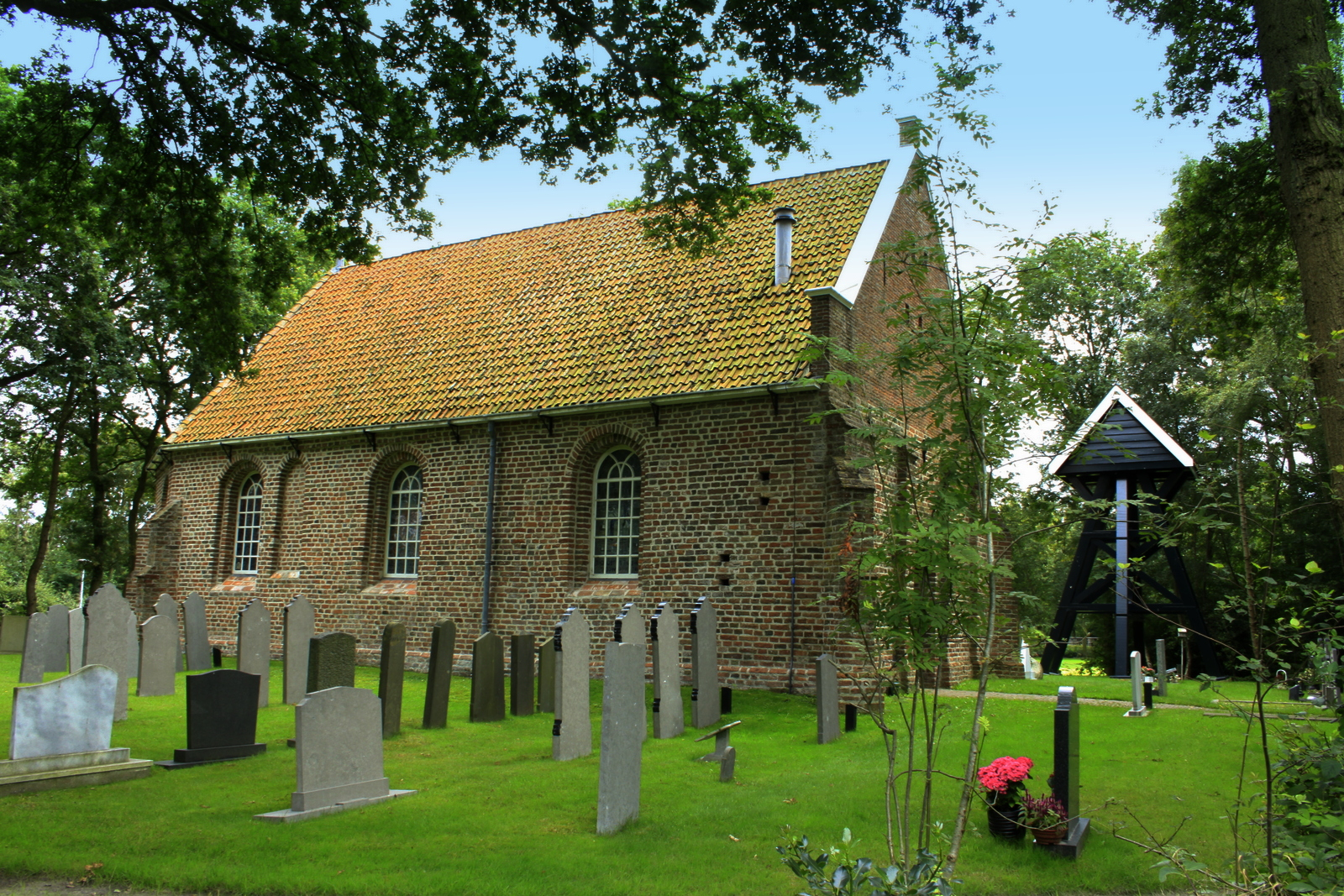 Het mooie zeer oude kerkje uit de 14e eeuw van Nieuweschoot, het is een Rijksmonument met monumentennummer 21188.